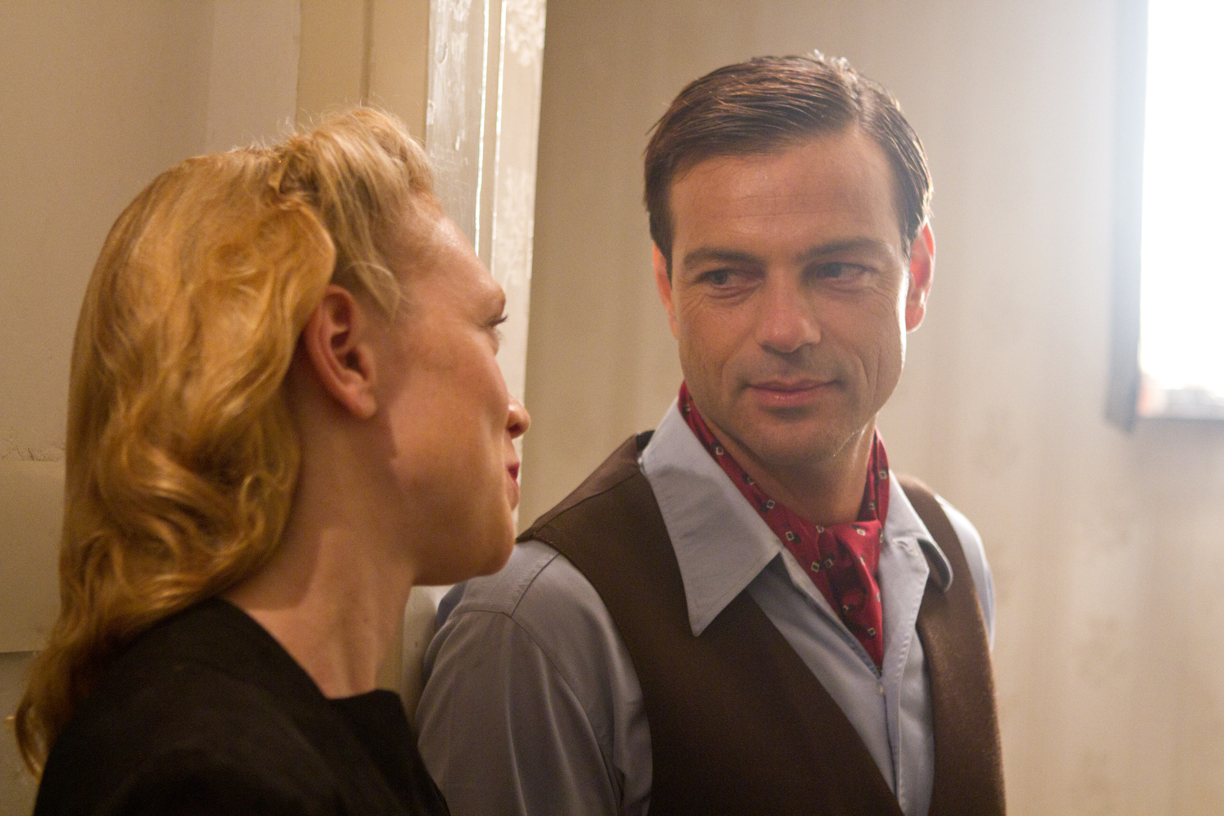 אקי אבני אלונה איב בסרטה של דינה צבי ריקליס ברקיע החמישי